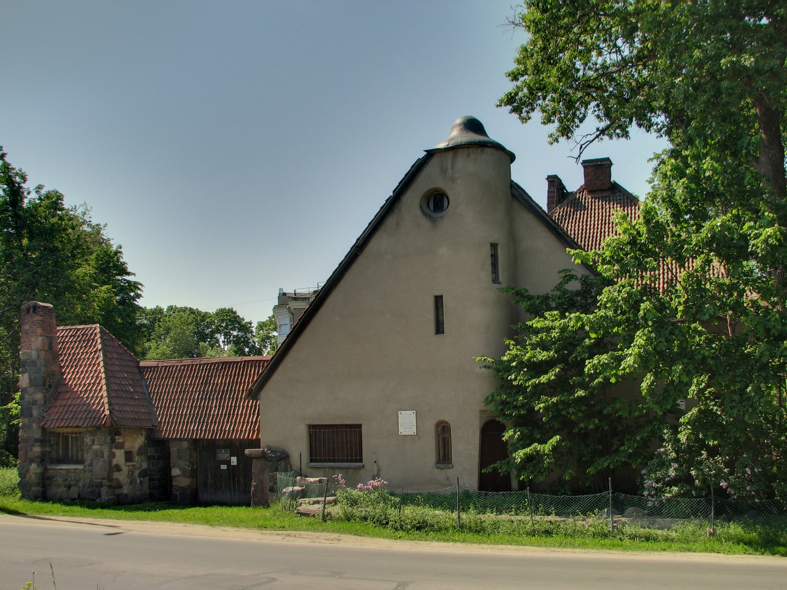 Музей-усадьба П. Е. Щербова. Gatchina